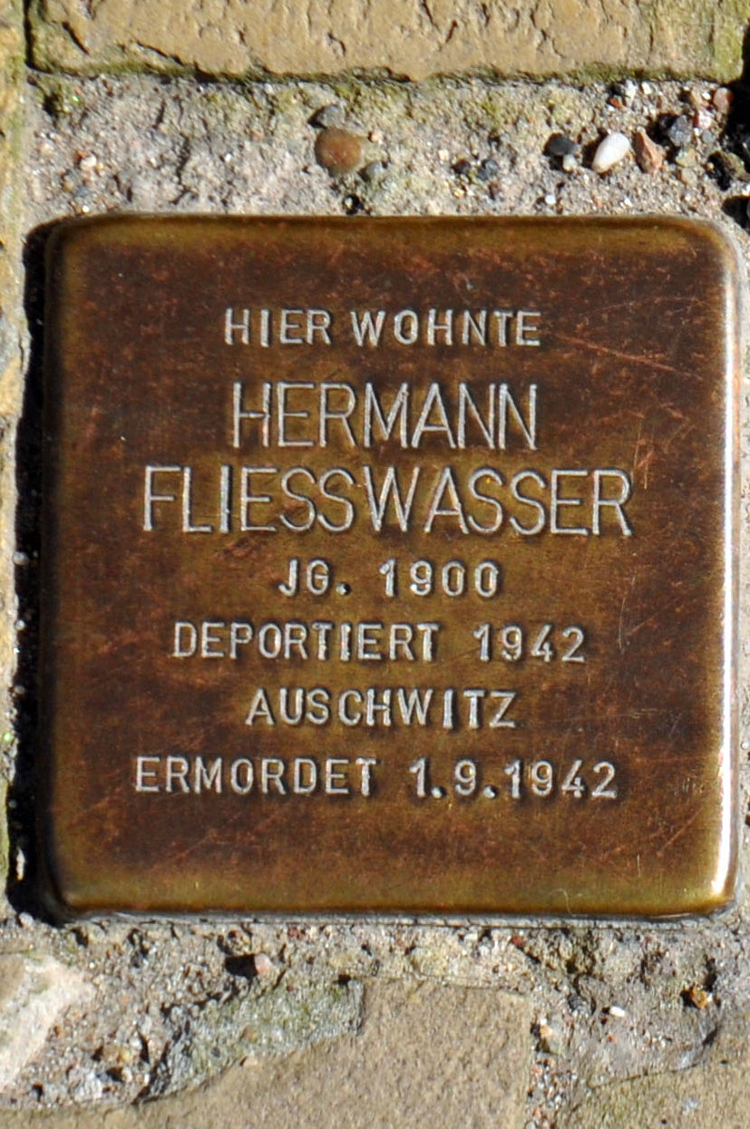 Stolperstein für Hermann Fliesswasser in Stralsund.